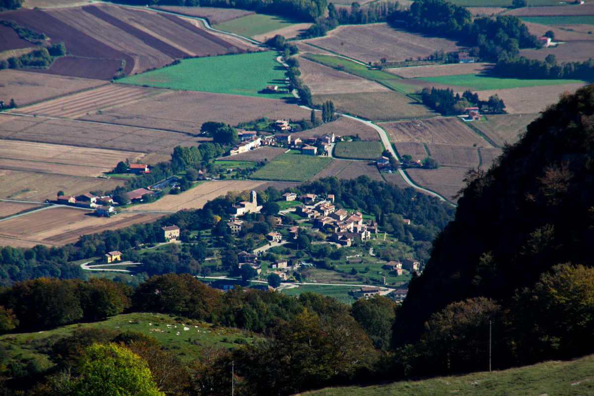 La vila del Mallol vista des del Puigsacalm